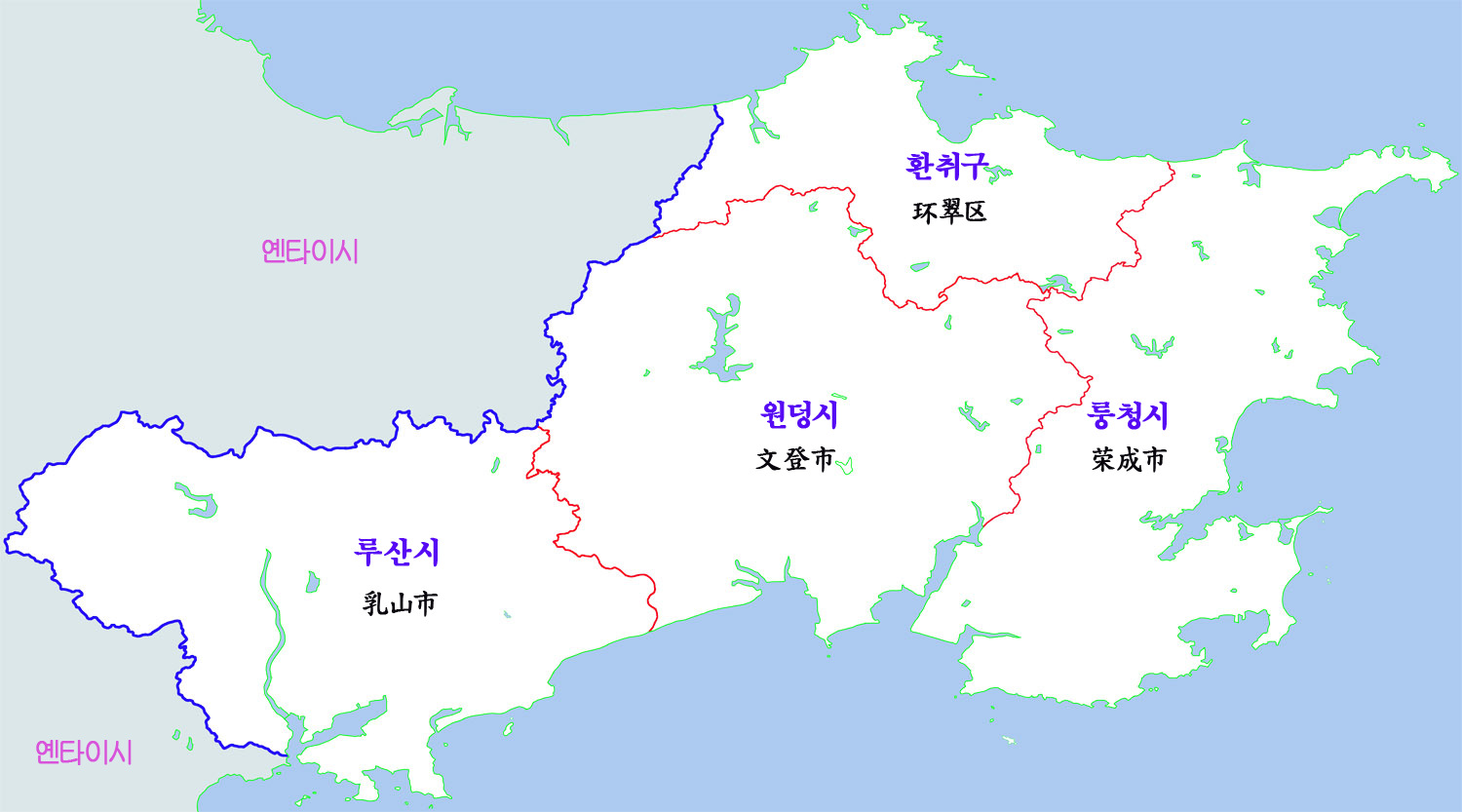 웨이하이시 현급구역도